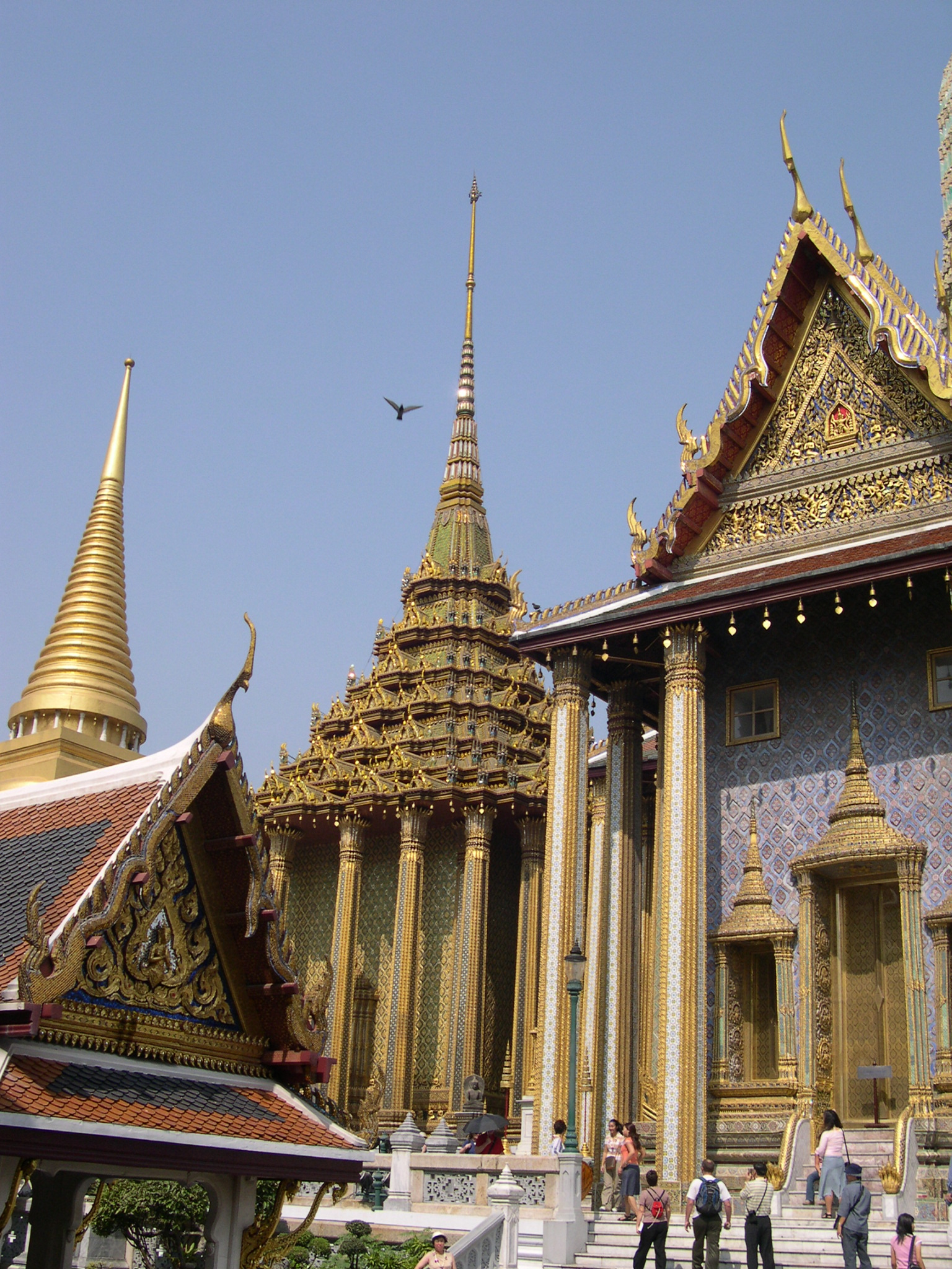 Autore: Stefano Romano, Wat Phra Kaeo - Palazzo reale a Bangkok, GFDL sono l'autore, scattata il 27 dic 2003 con macchina digitale Nikon.